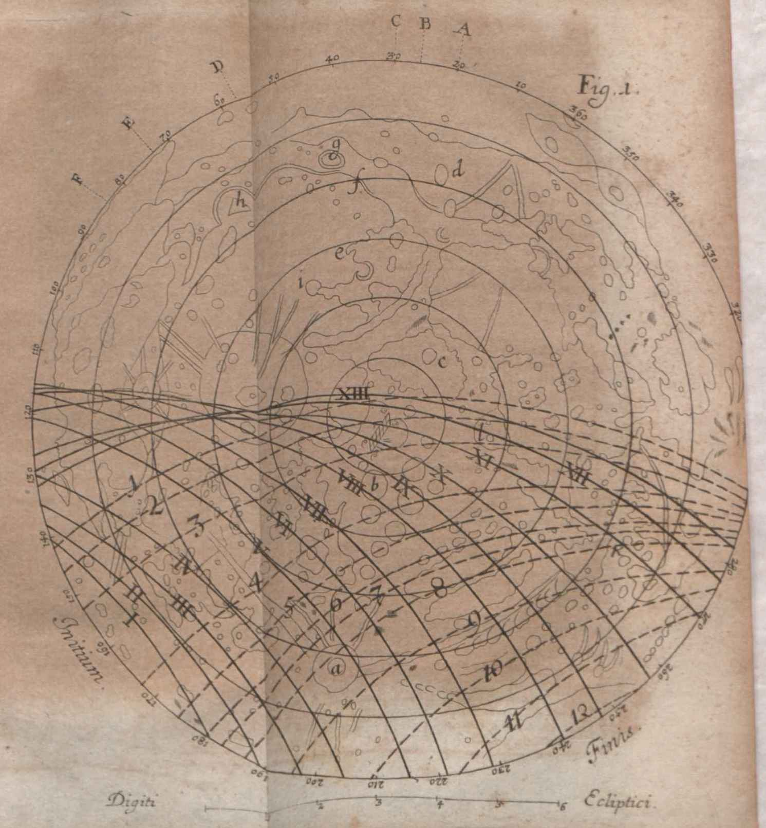 Illustration